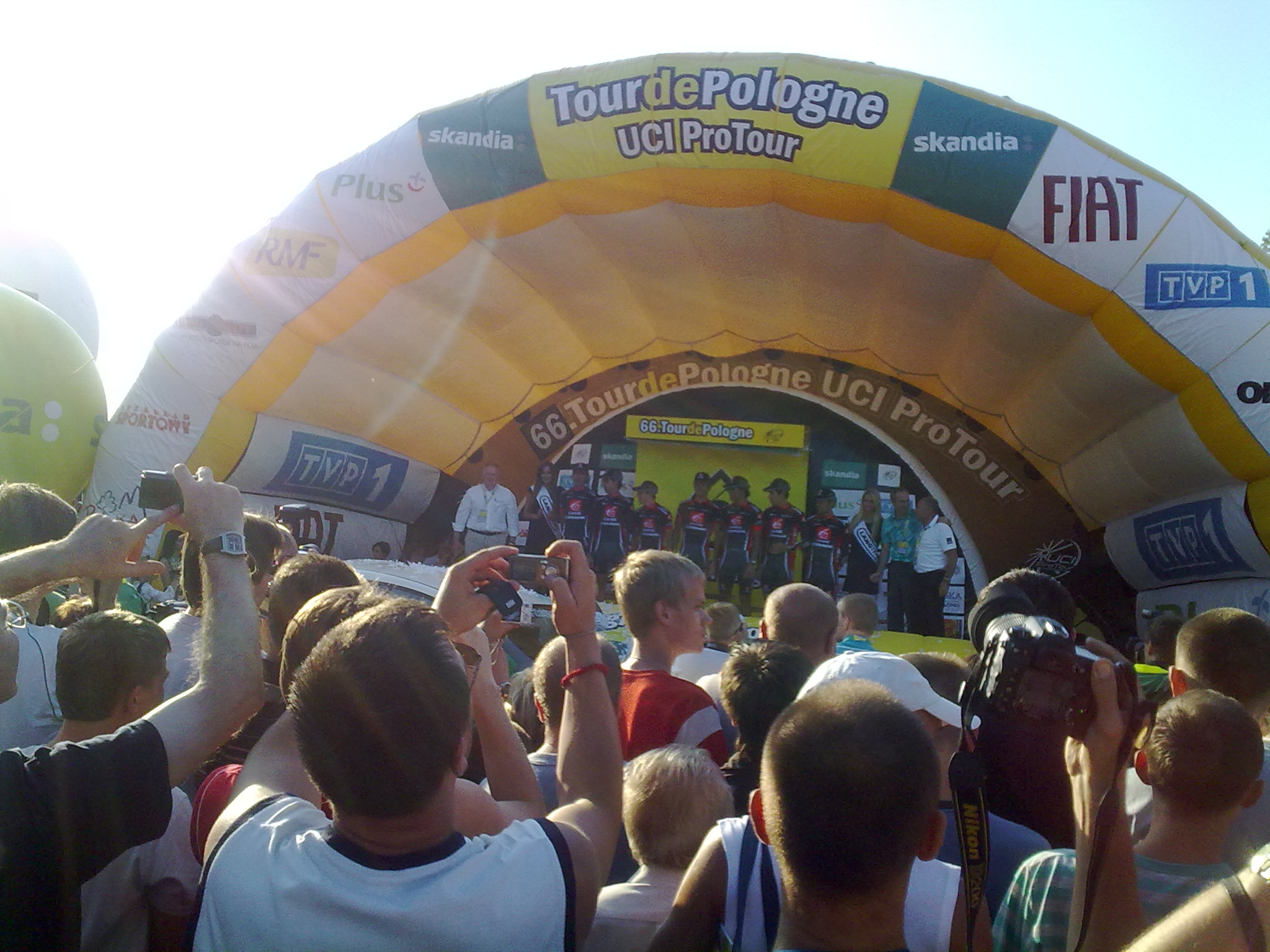 Najlepszy zespół TdP 2009 - Caisse d'Epargne